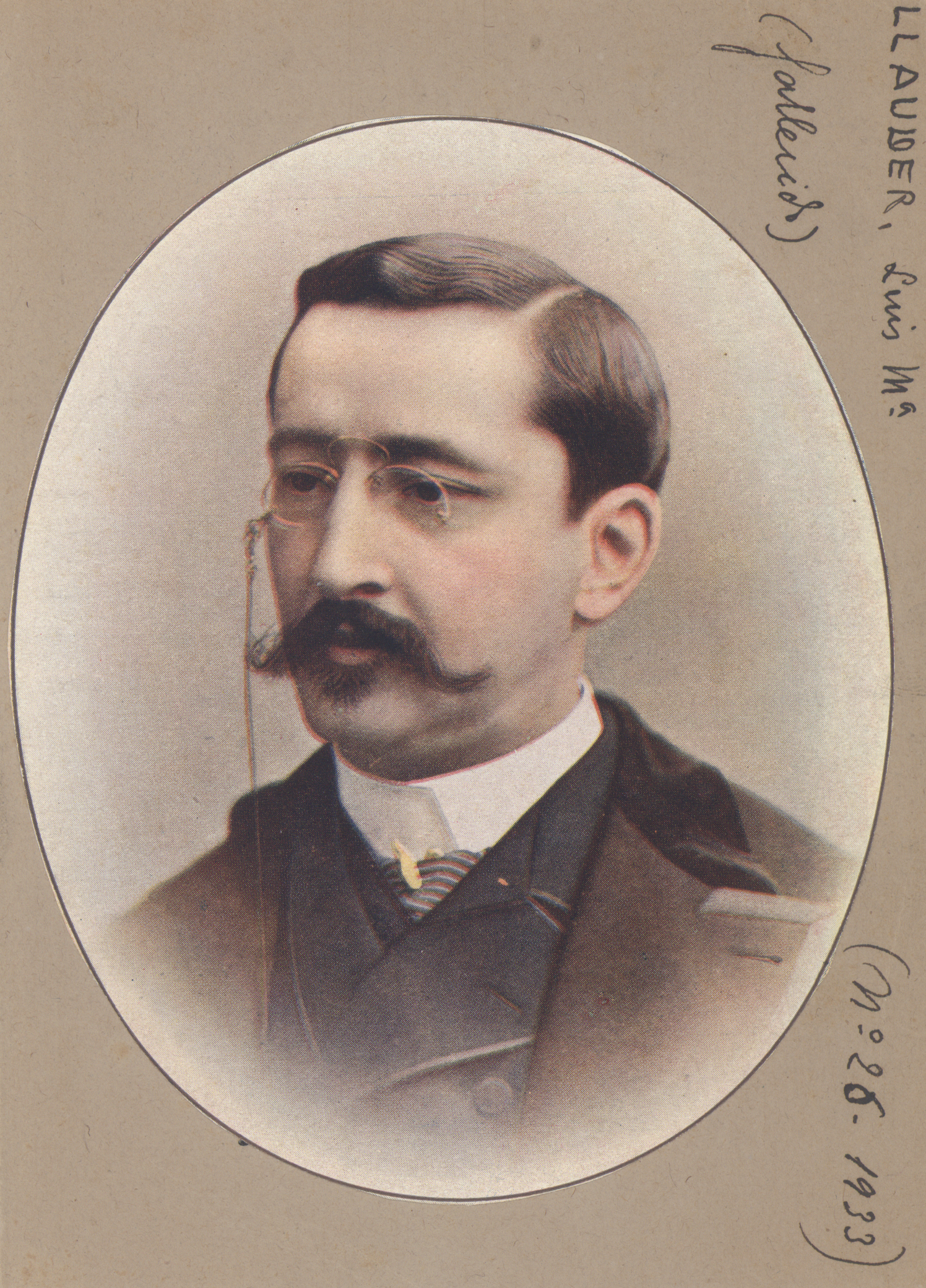 Lluís Maria de Llauder i de Dalmases (1837-1902) va fundar La Formiga d'Or al 1885. També va ser un dels artífexs del diari El Correo Catalán.